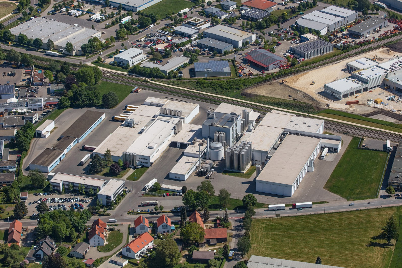 Unternehmensgelände von oben